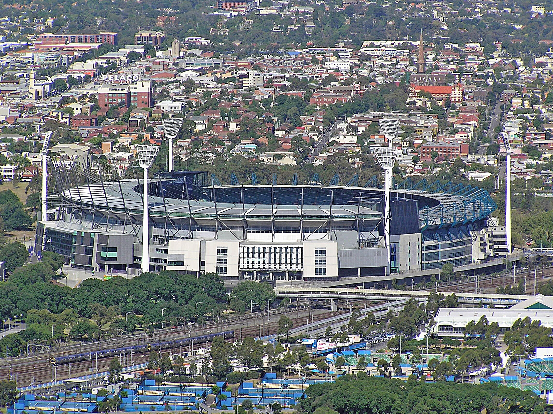 Melbourne MCG